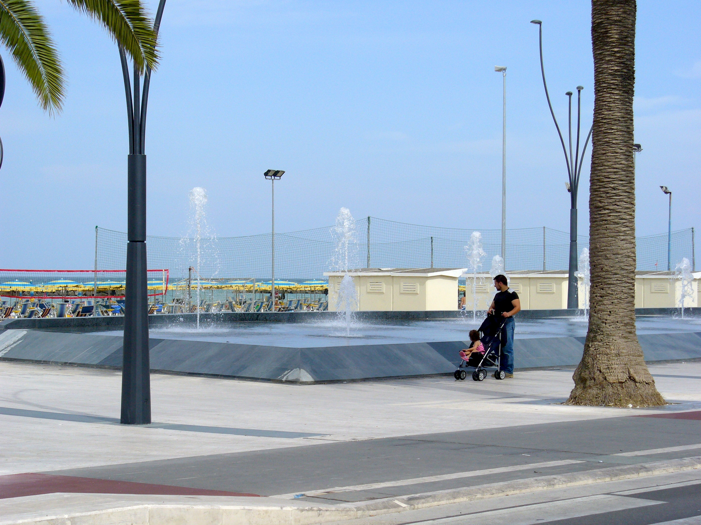 Foto di uno scorcio del lungomare Roma di Roseto degli Abruzzi, raffigurante un'opera realizzata durante l'ultimo restyling.